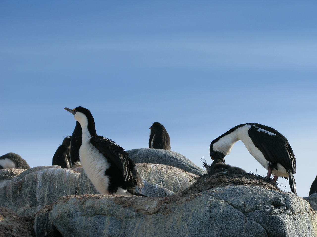 Leucocarbo bransfieldensis en Antarctique 64°52'S 63°34'W île Doumer Chenal Peltier